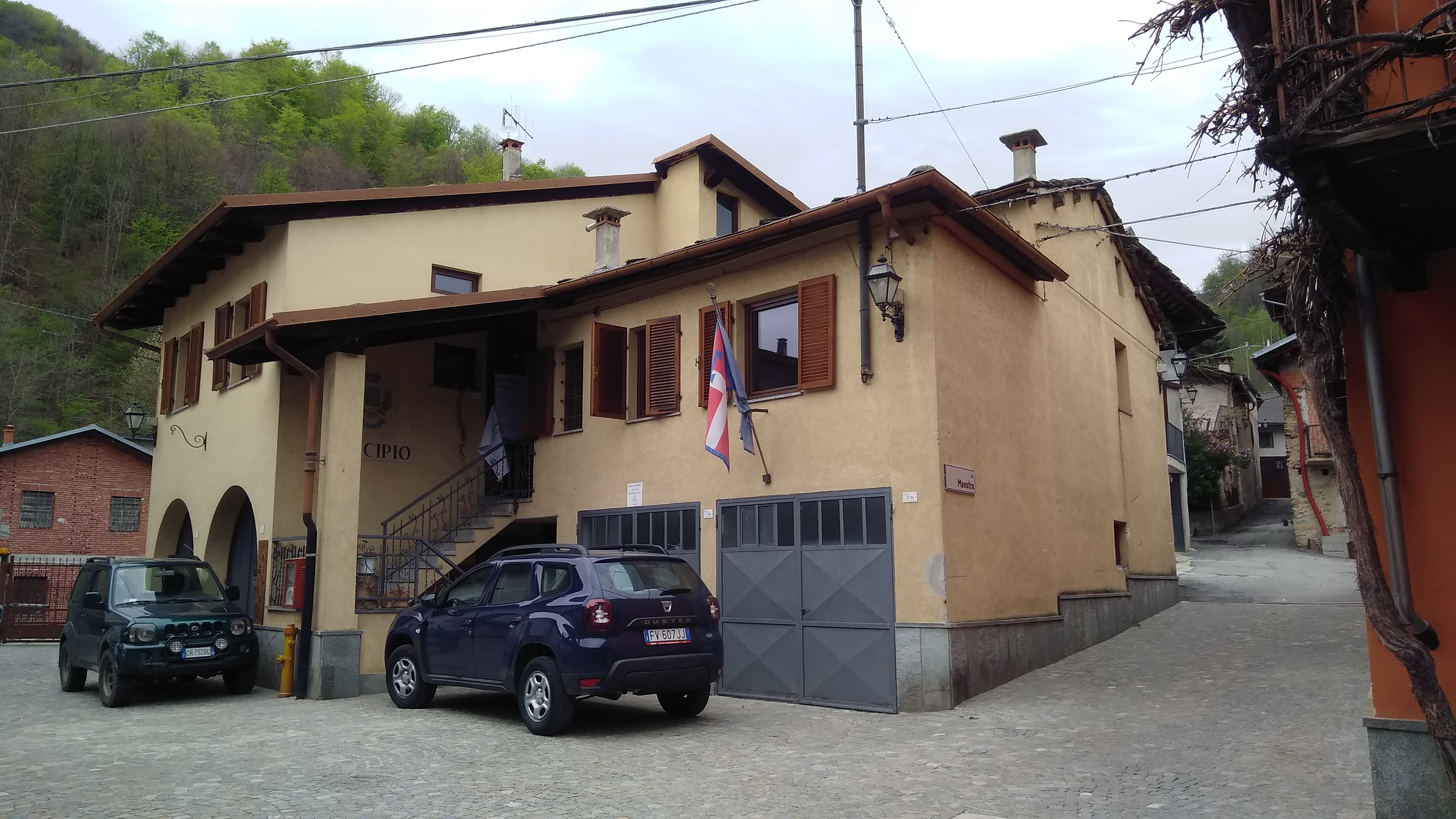 Isasca (CN): municipio